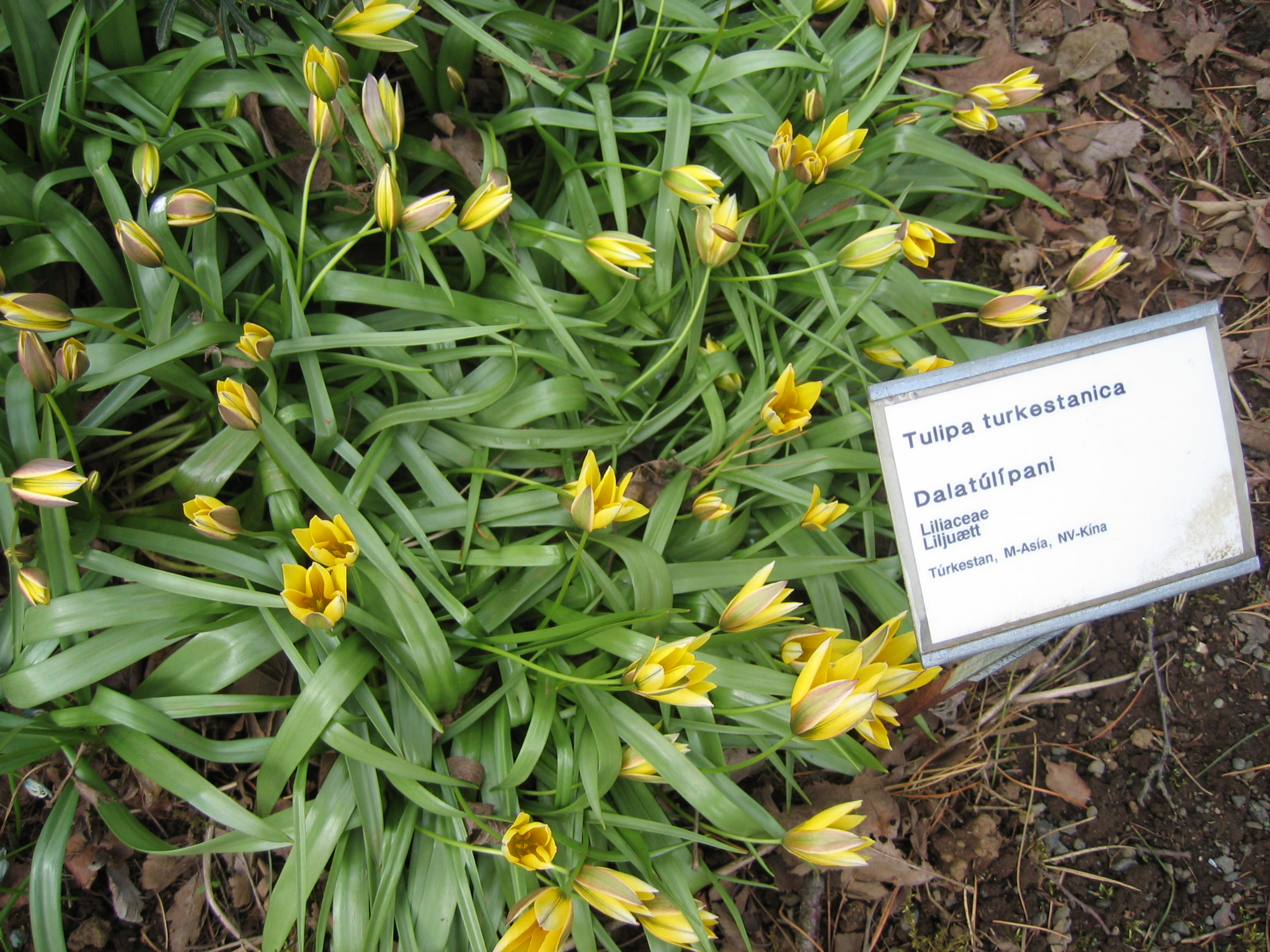 photo taken by Salvör in Grasagarður Reykjavíkur Botanical garden in Reykjavik, Iceland.